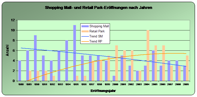 Shopping Mall und Retailpark Eröffnung nach Jahren beginnend 1988